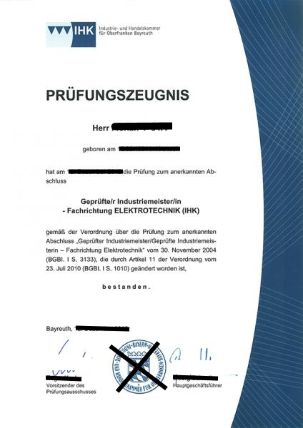 Prüfungszeugnis einer deutschen Industrie- und Handelskammer für einen Industriemeister im Fach Elektrotechnik